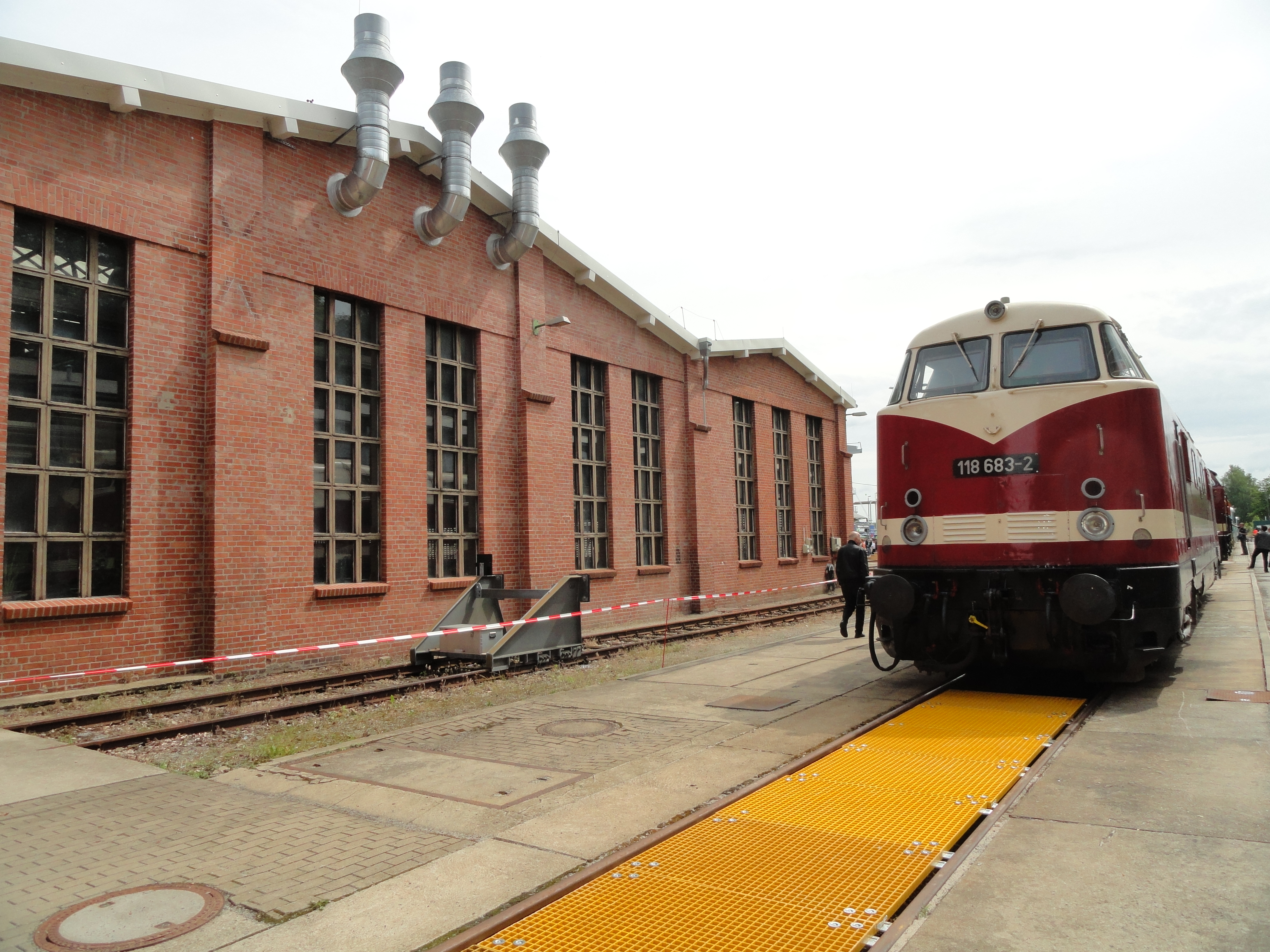 Diesellokomotive 118 683-2 auf Gleis 43 des ehem. Bahnbetriebswerks Görlitz